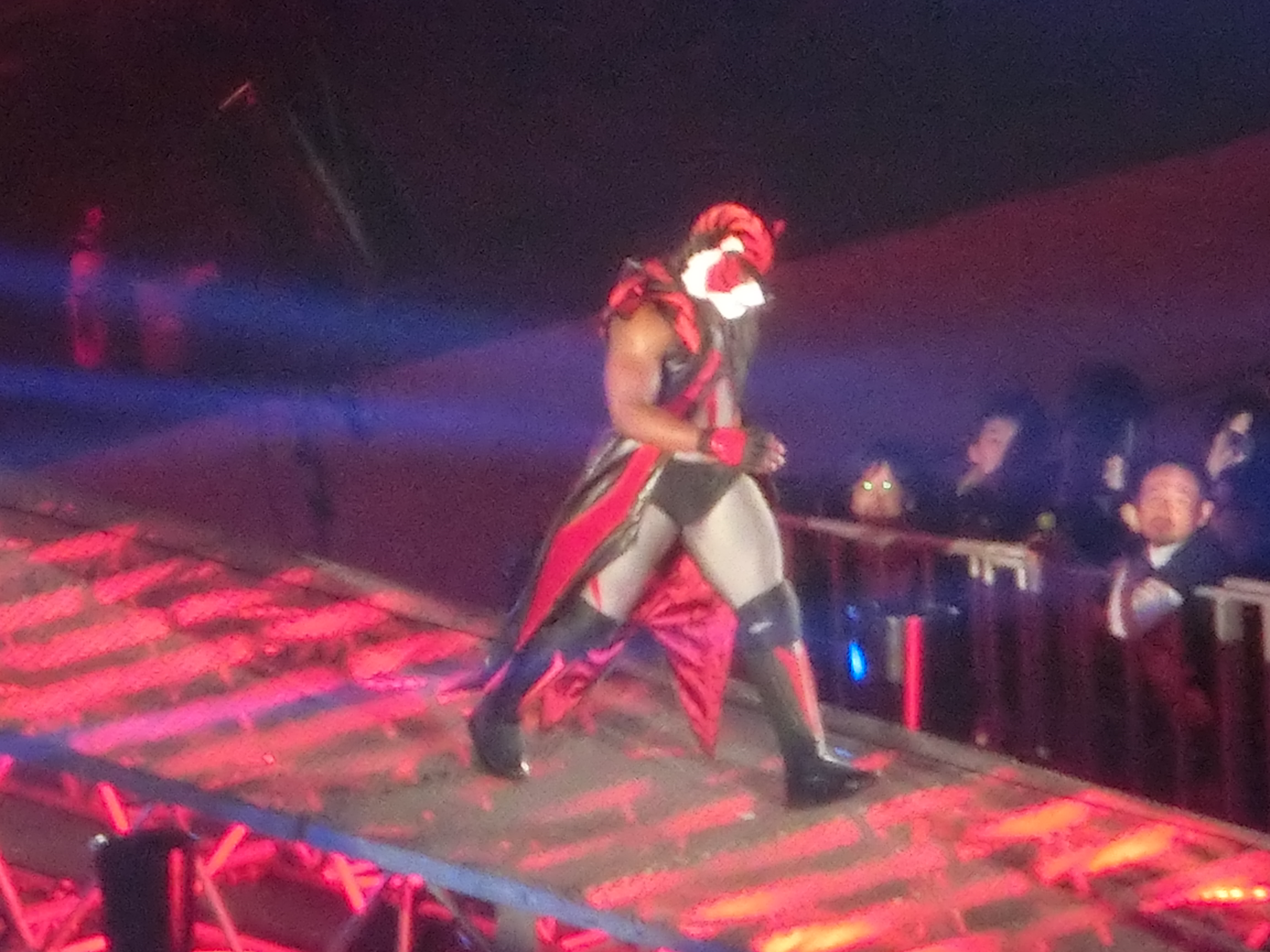 2017年1月4日東京ドーム タイガー・ザ・ダーク